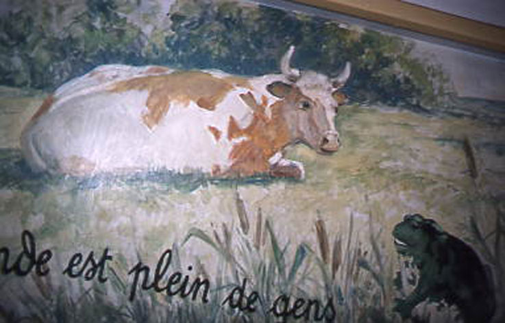 illustration de la fable de Jean de La Fontaine: La grenouille qui veut se faire aussi grosse que le boeuf; Livre I Fable III